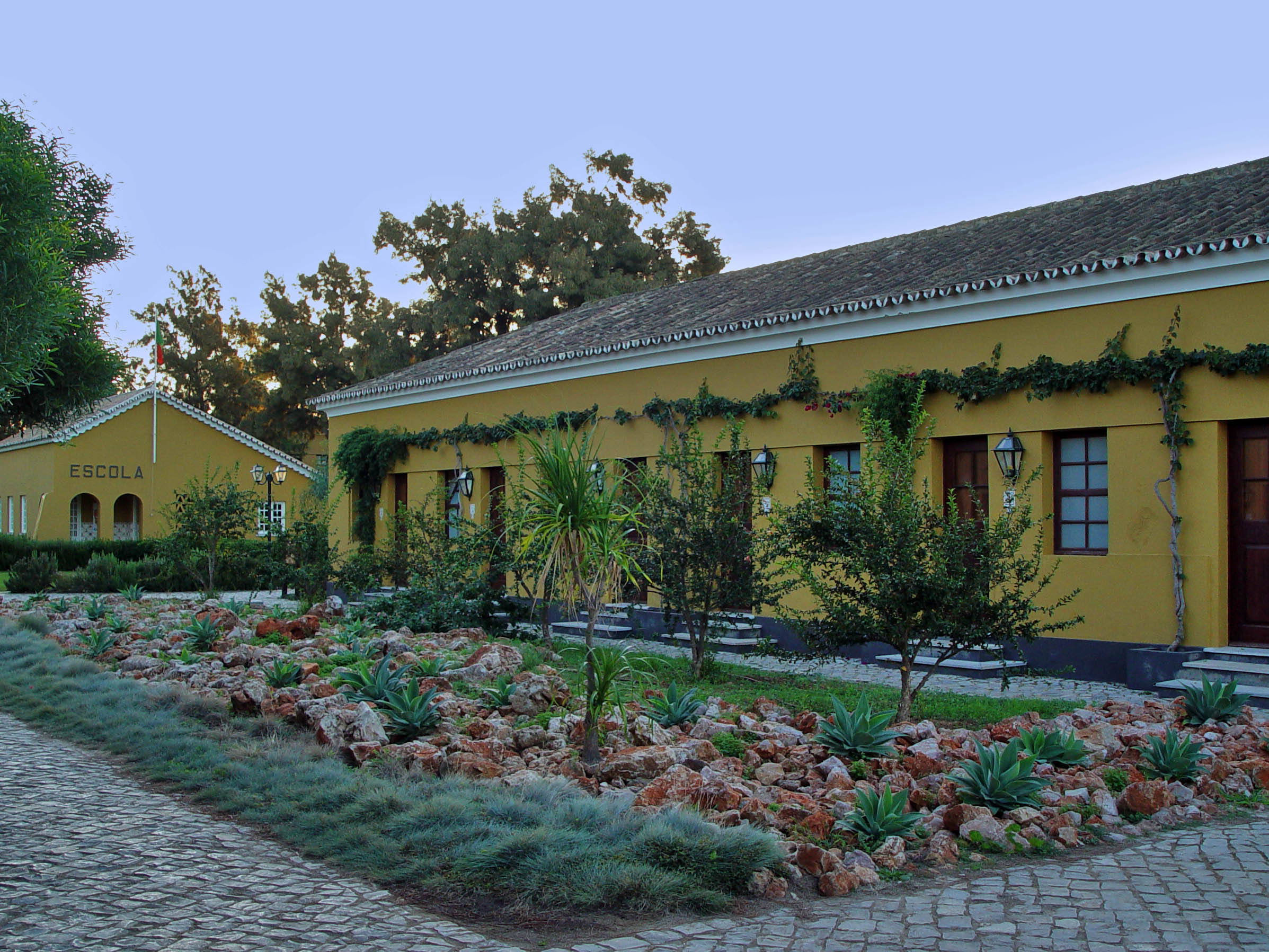 Arraial Ferreira Neto This file was uploaded for Wiki Loves Monuments in Portugal with the unique identifier 72493.